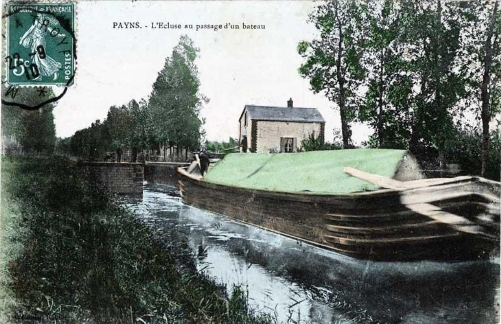 Écluse de Villacerf sur le canal de la Haute-Seine en 1910. 10600 Payns.